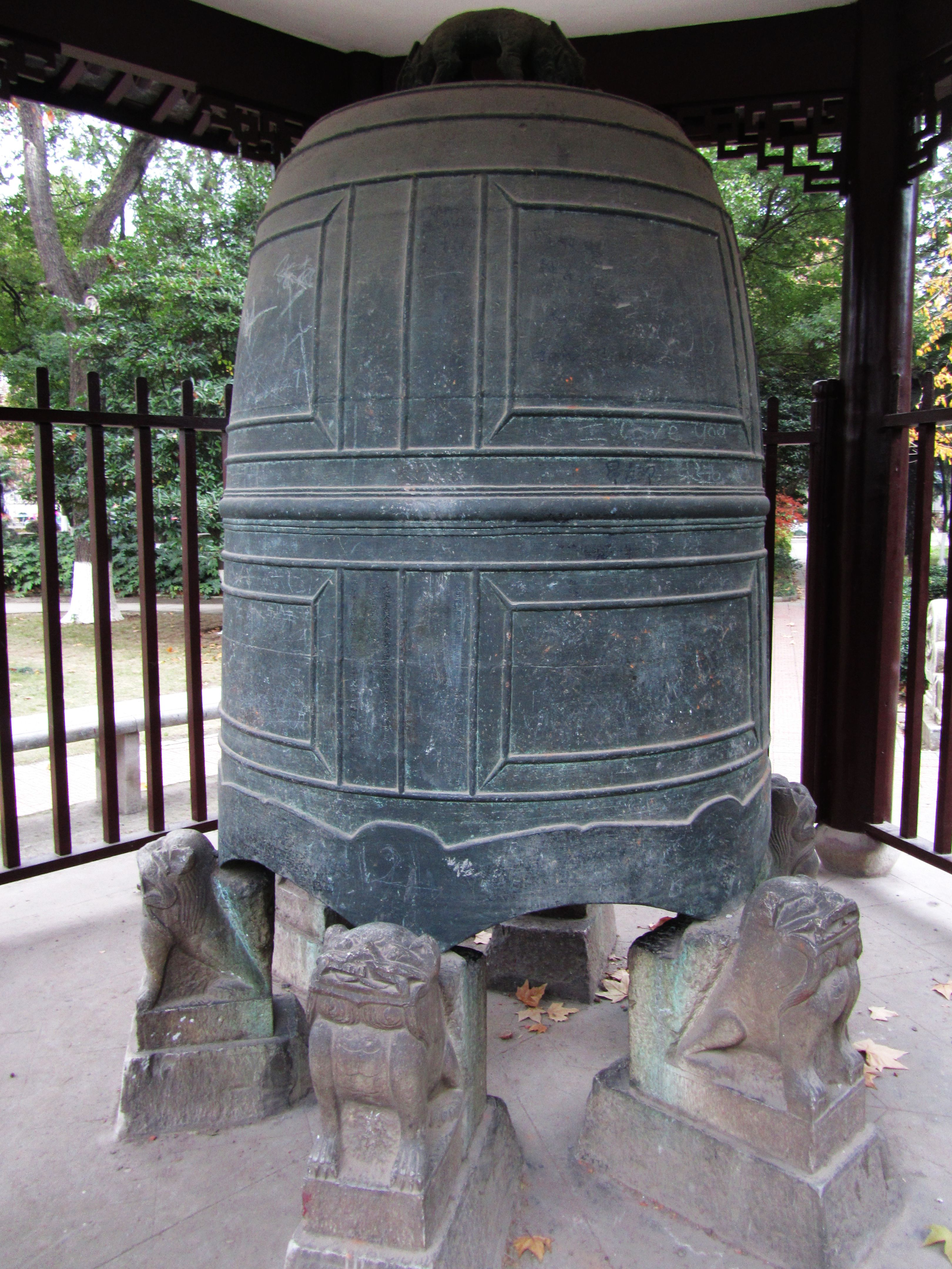 丹阳唐中和铜钟。